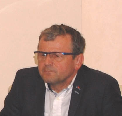 Pavel Havíř (2014)